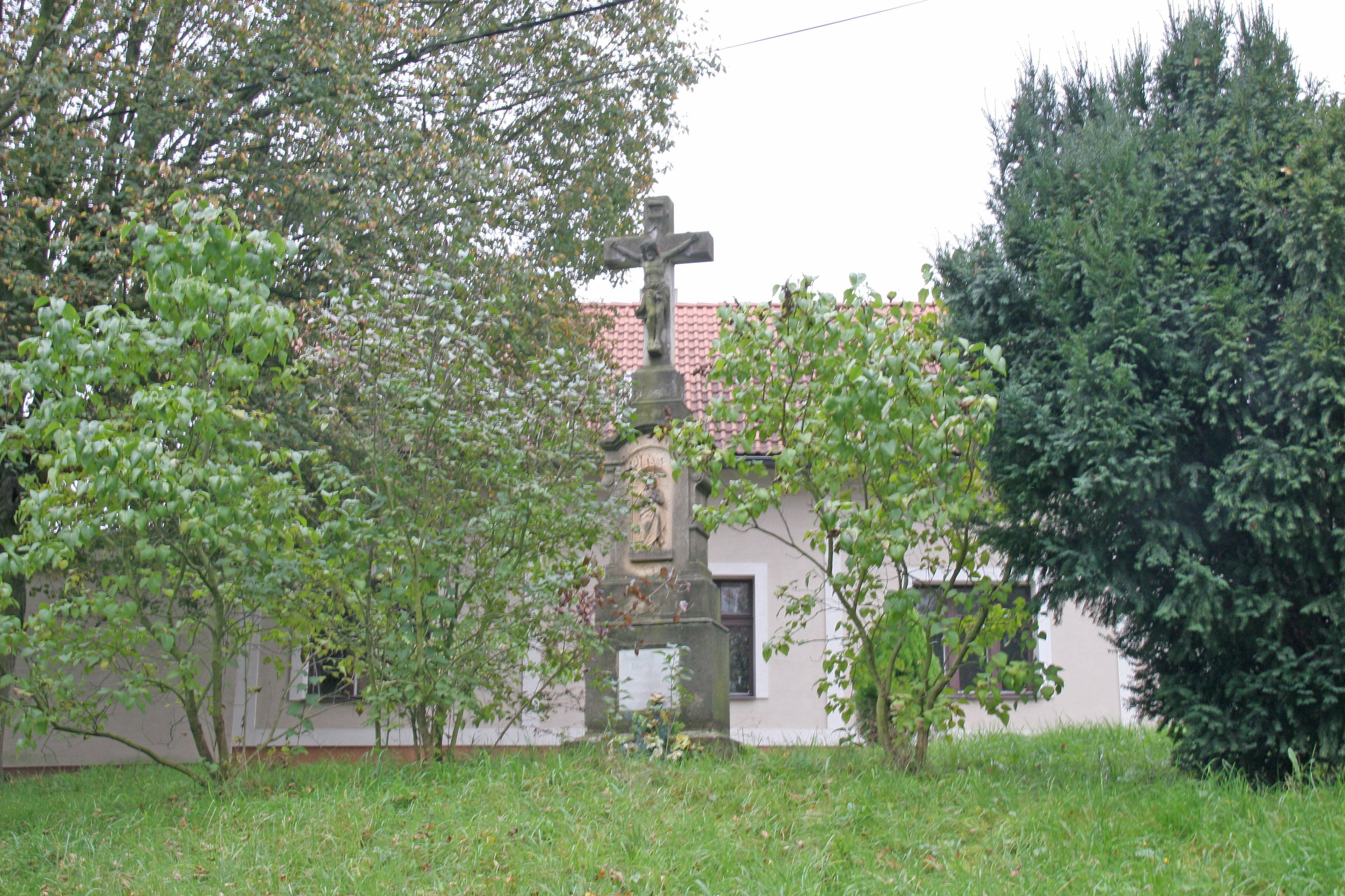 Kundratice kříž